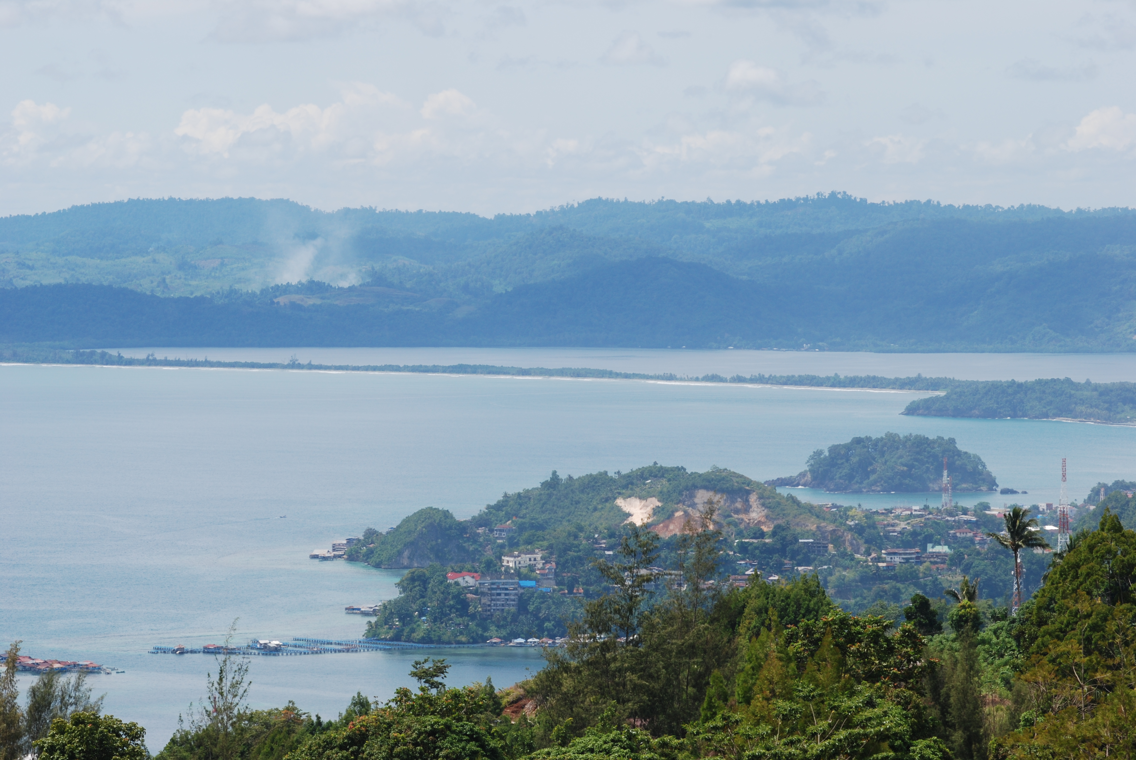 Teluk Youtefa_Jayapura_Papua